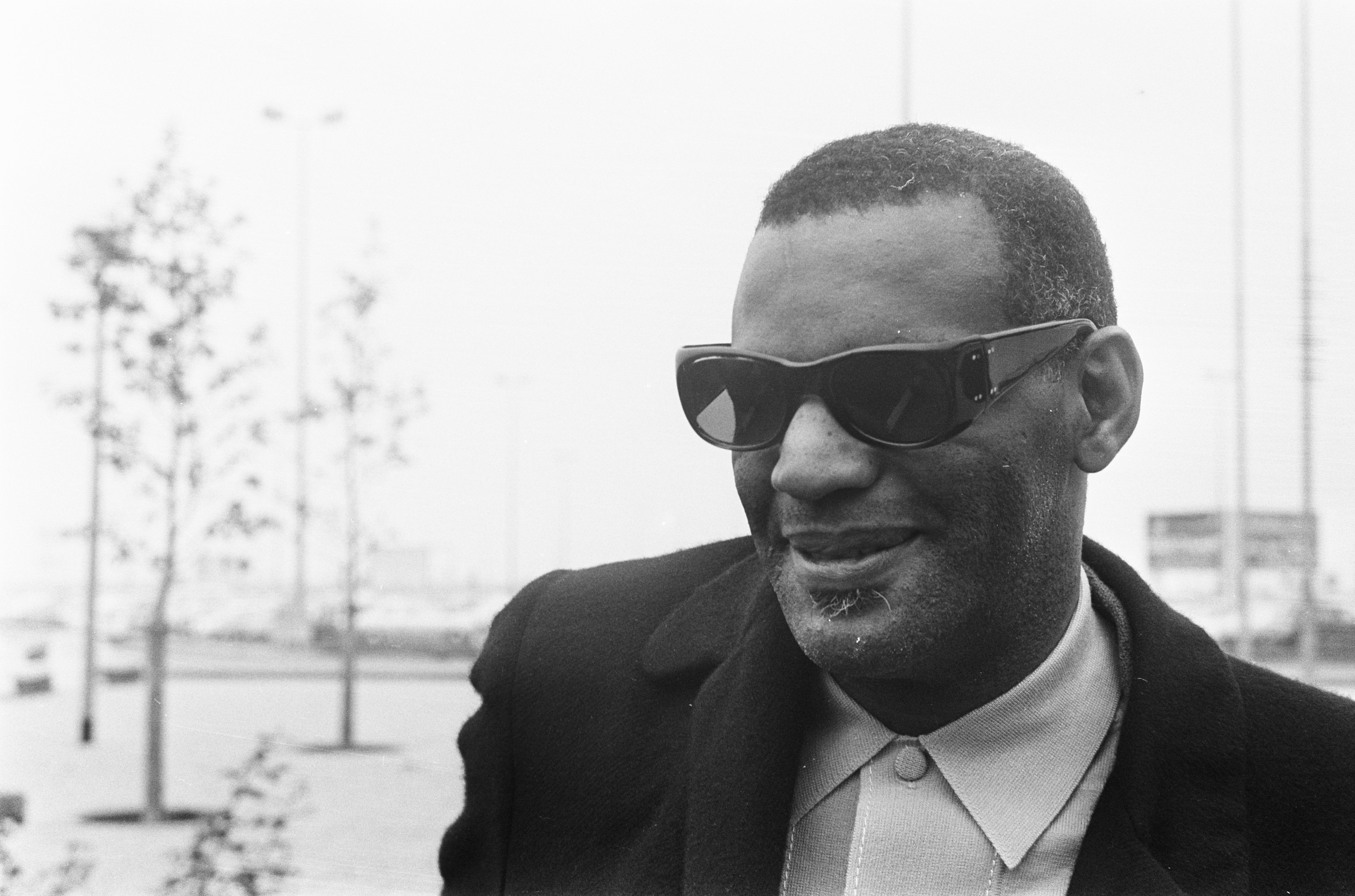 Collectie / Archief : Fotocollectie Anefo Reportage / Serie : [ onbekend ] Beschrijving : Aankomst Ray Charles (kop) op Schiphol Datum : 5 oktober 1968 Locatie : Noord-Holland, Schiphol Trefwoorden : KOPPEN, aankomsten Persoonsnaam : Charles, Ray Fotograaf : Koch, Eric / Anefo Auteursrechthebbende : Nationaal Archief Materiaalsoort : Negatief (zwart/wit) Nummer archiefinventaris : bekijk toegang 2.24.01.05 Bestanddeelnummer : 921-7410